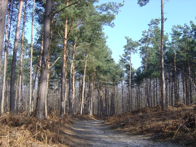 Forêt de Montmorency, dans le Val-d'Oise (Ile de France, France)